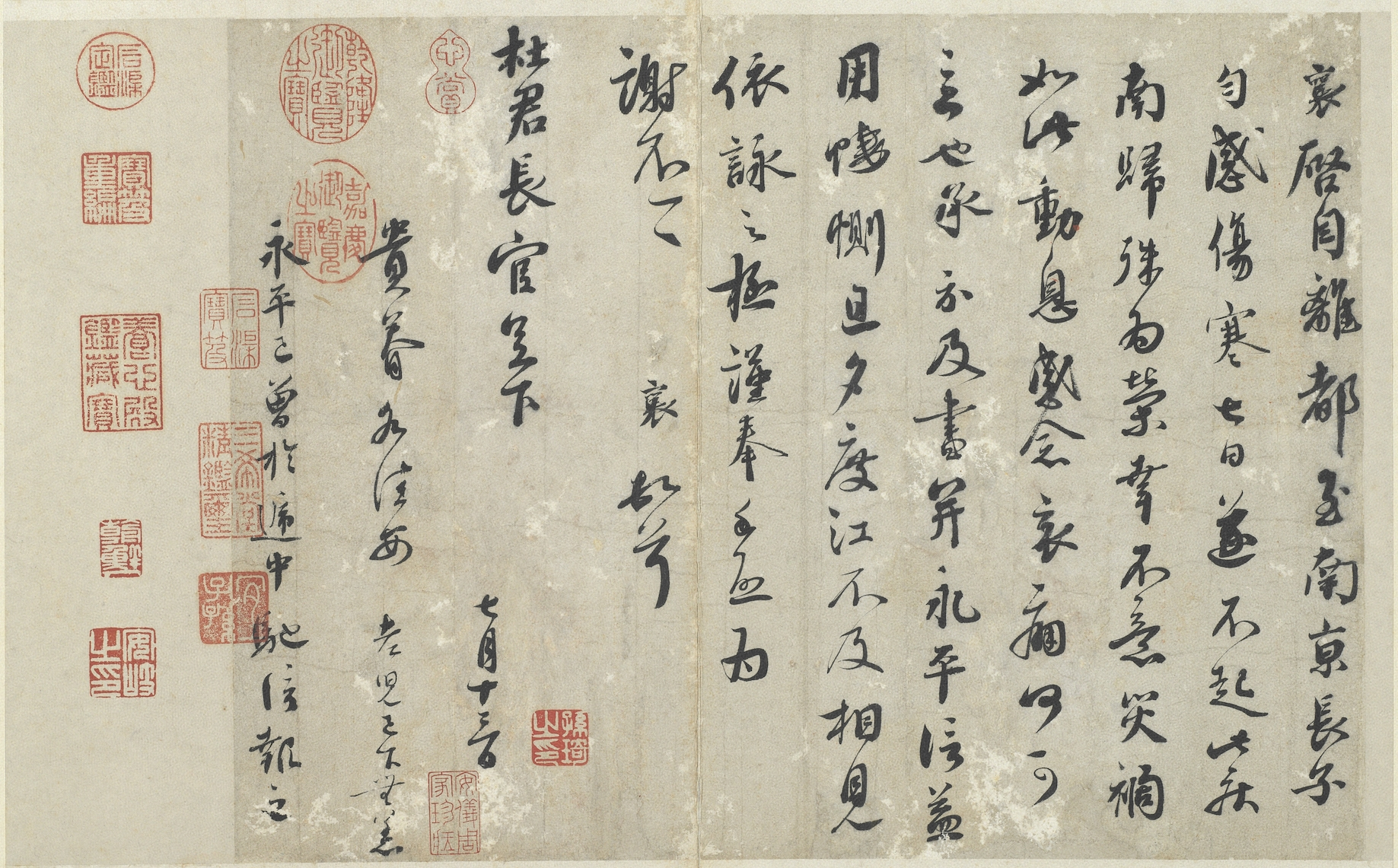 《離都帖》，原名《致杜君長官尺牘》，現藏國立故宮博物院。 釋文：襄啟。自離都至南京。長子勻感傷寒七日。遂不起此疾。南歸殊為榮幸。不意災禍如此。動息感念。哀痛何可言也。承示及書。并永平信。益用悽惻。旦夕渡江。不及相見。依詠之極。謹奉手啟為謝。不一一。襄頓首。杜君長官足下。七月十三日。貴眷各佳安。老兒已下無恙。永平已曾於遞中。馳信報之。